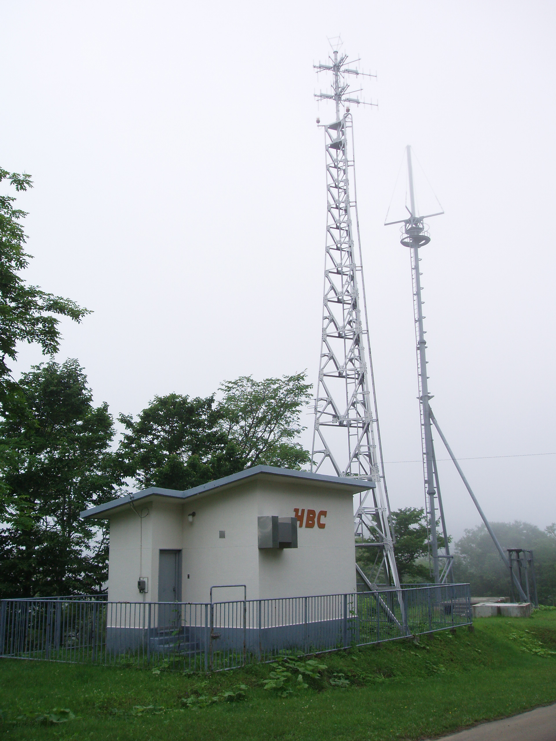 広尾中継局 HBC送信設備